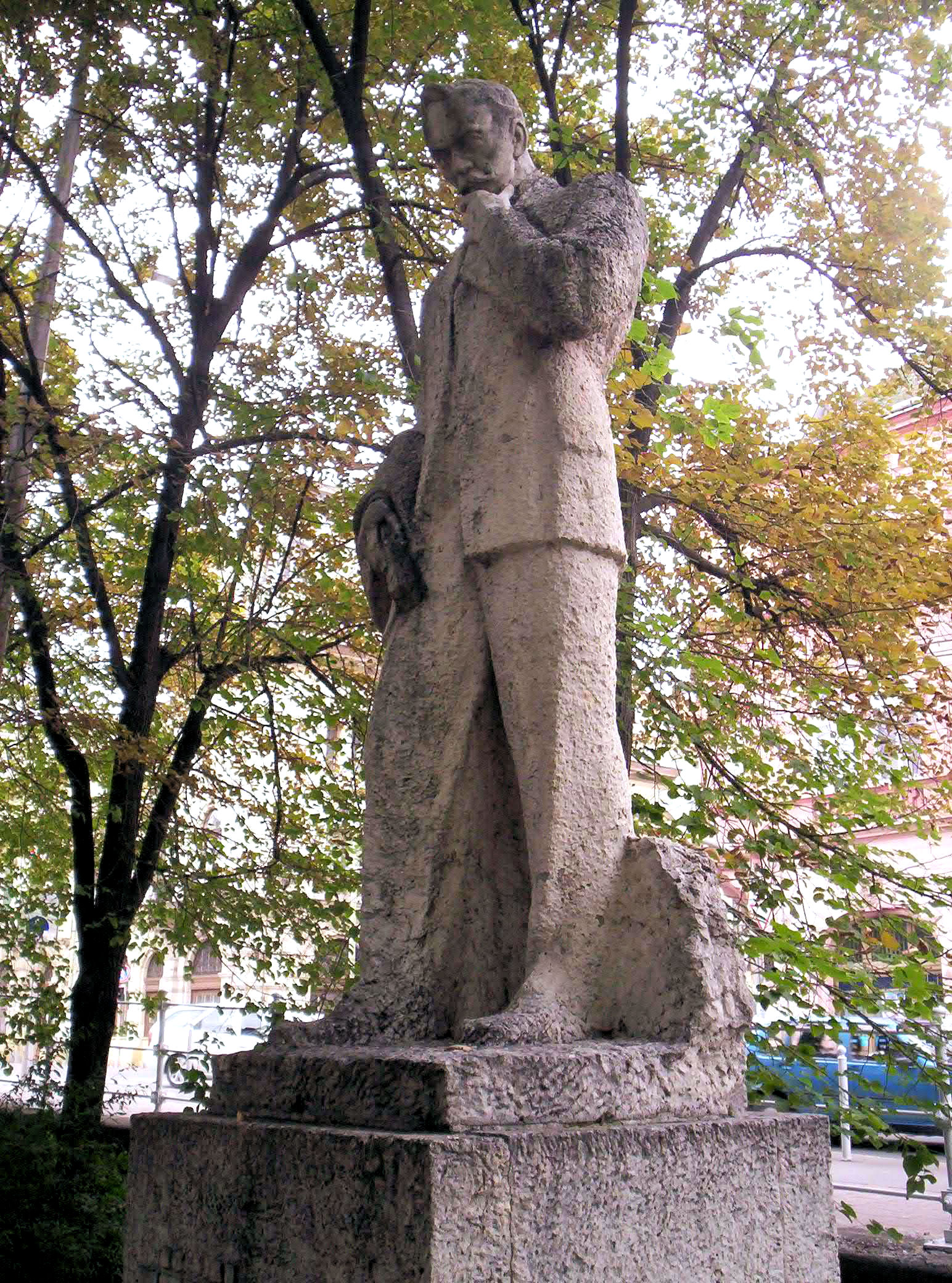 Tömörkény István szobra Szegeden. Tápai Antal alkotása